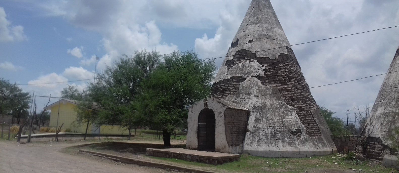 Antiguos silos de grano en Santa Rosa, El Llano, Aguascalientes